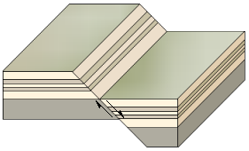 Autor: Usuario:Luis María Benítez